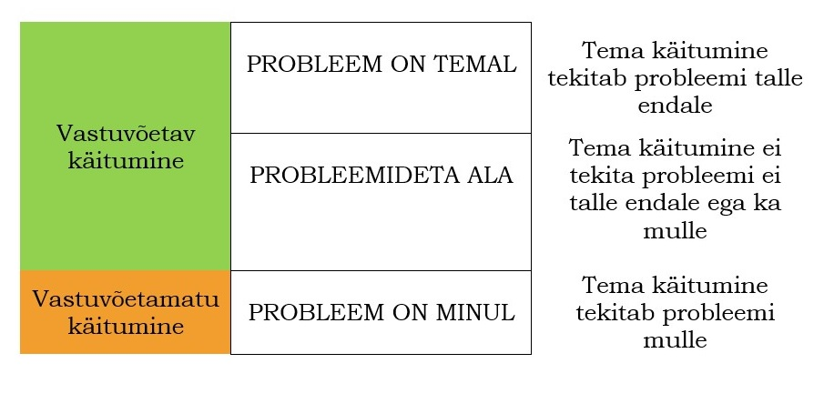 Probleemse olukorra kaardistamise abivahend ehk Gordoni aken